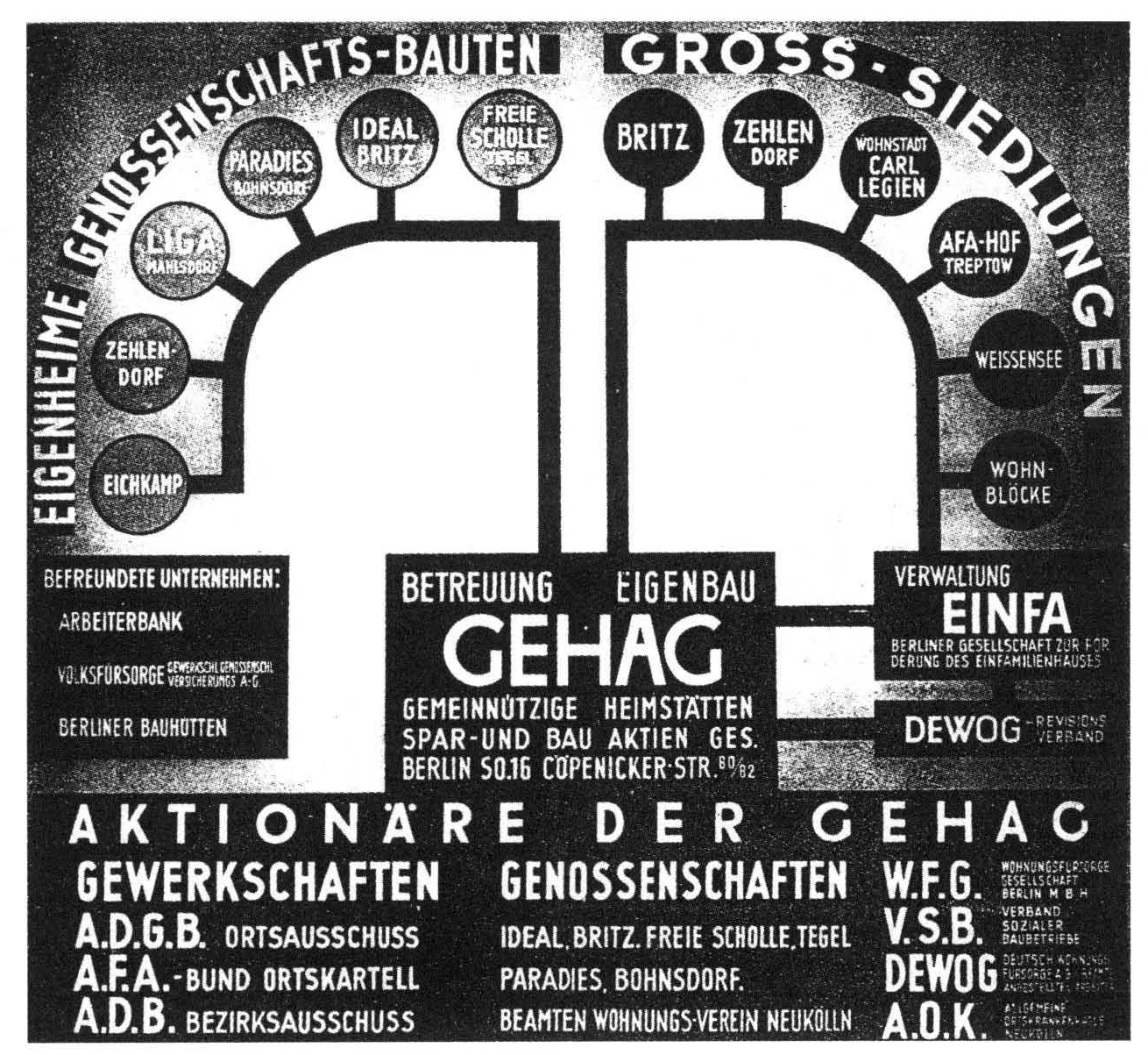 Aktionäre der GEHAG (Gewerkschaften, Baugenossenschaften usw.)